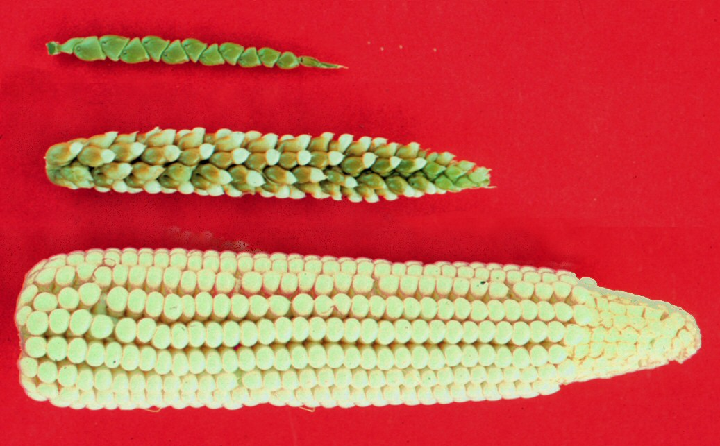 An image depicting Teosinte, Maize-teosinte hybrid, Maize.